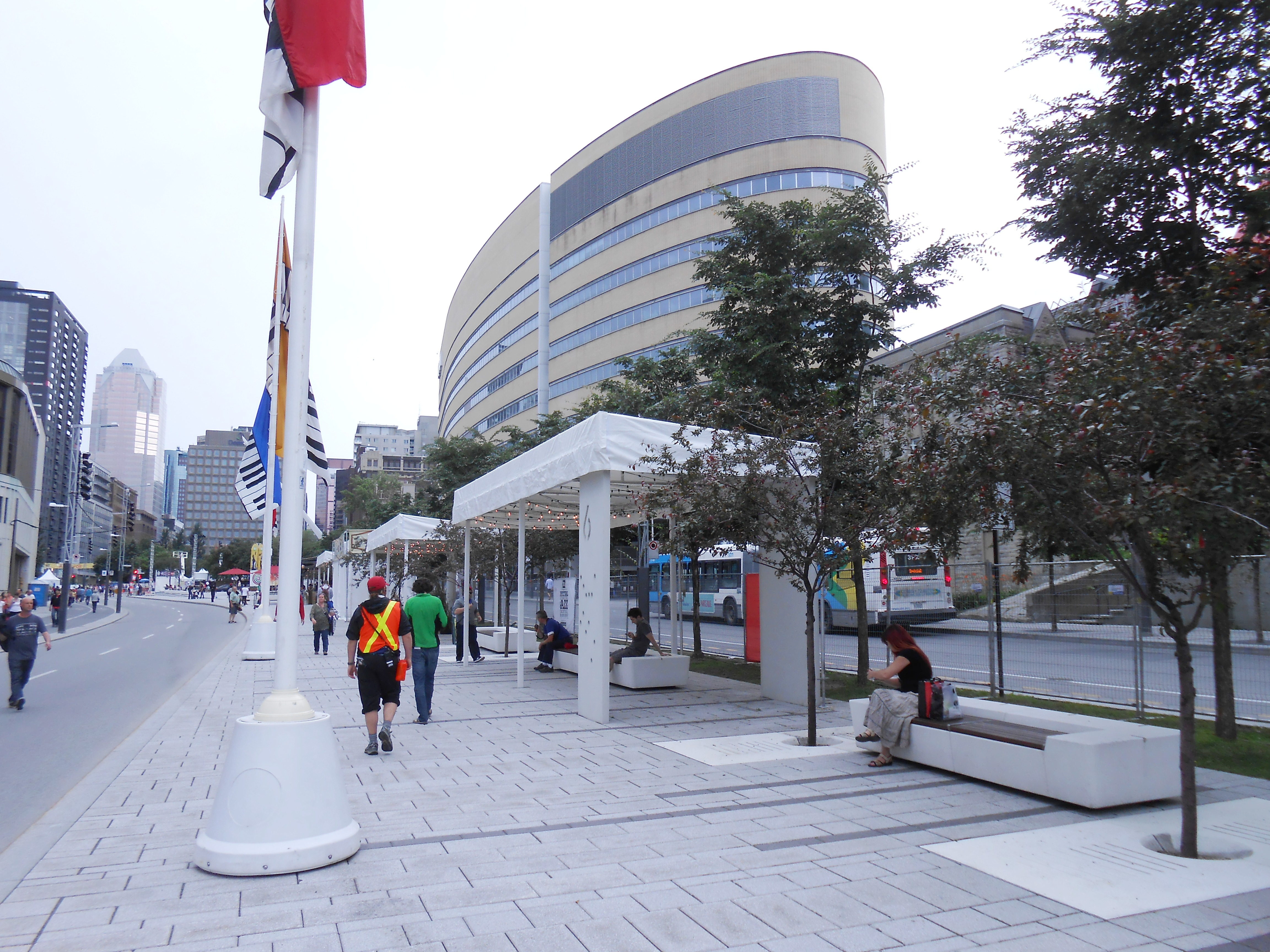 La promenade des Artistes, Quartier des spectacles